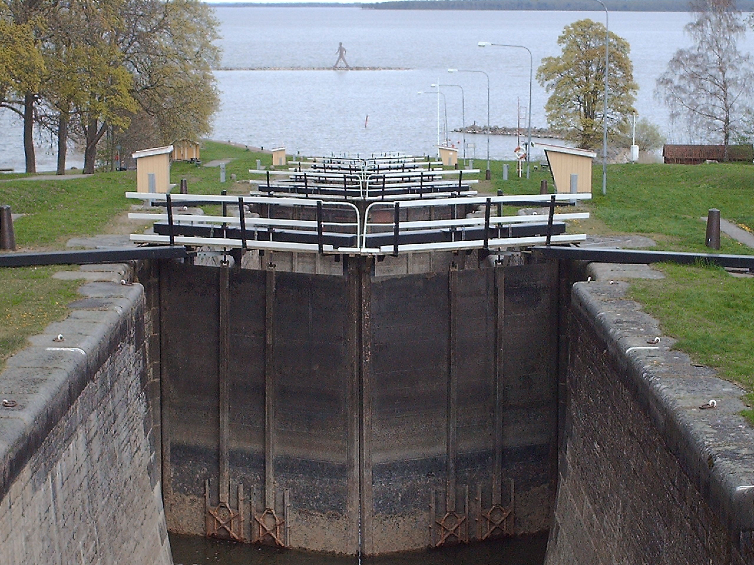 Berg, Göta Canal, Sweden